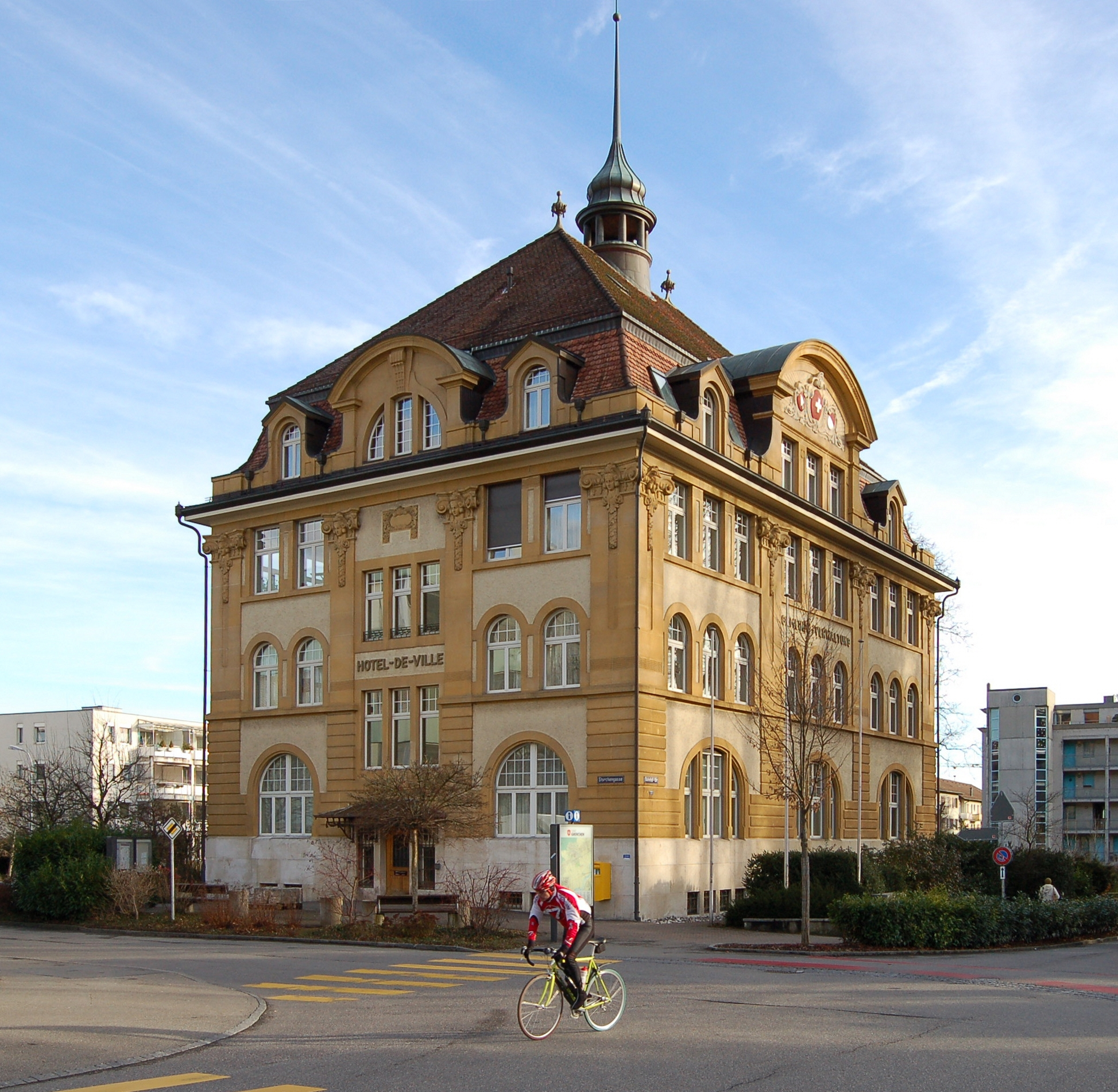 Sitz der Verwaltung und Stadtpräsidium, Grenchen Süd